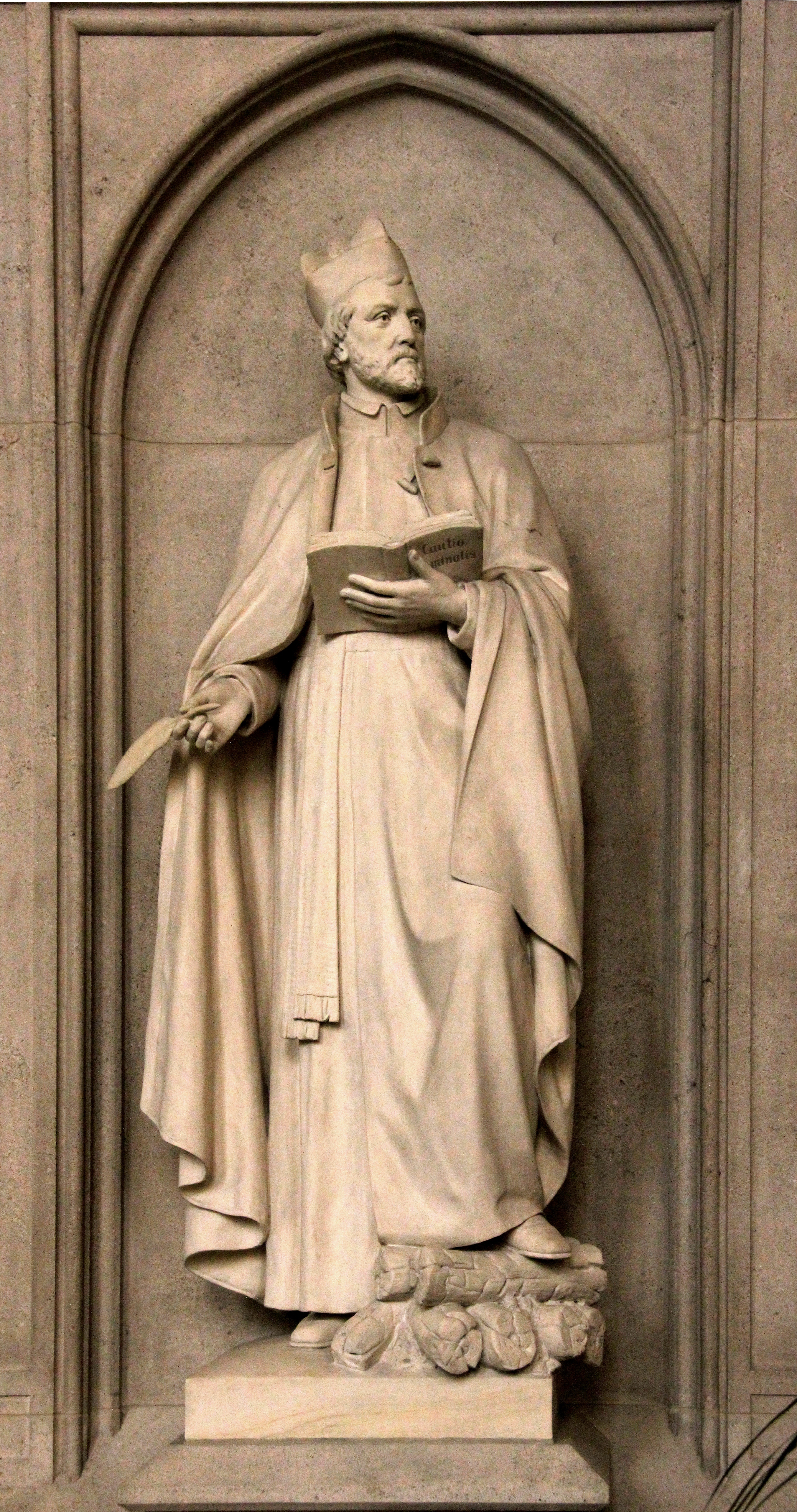 Trier Jesuitenkirche, Friedich Spee, Denkmal von Wilhelm Albermann (1835–1913)